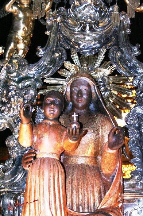 M. SS. Dei poveri Seminara